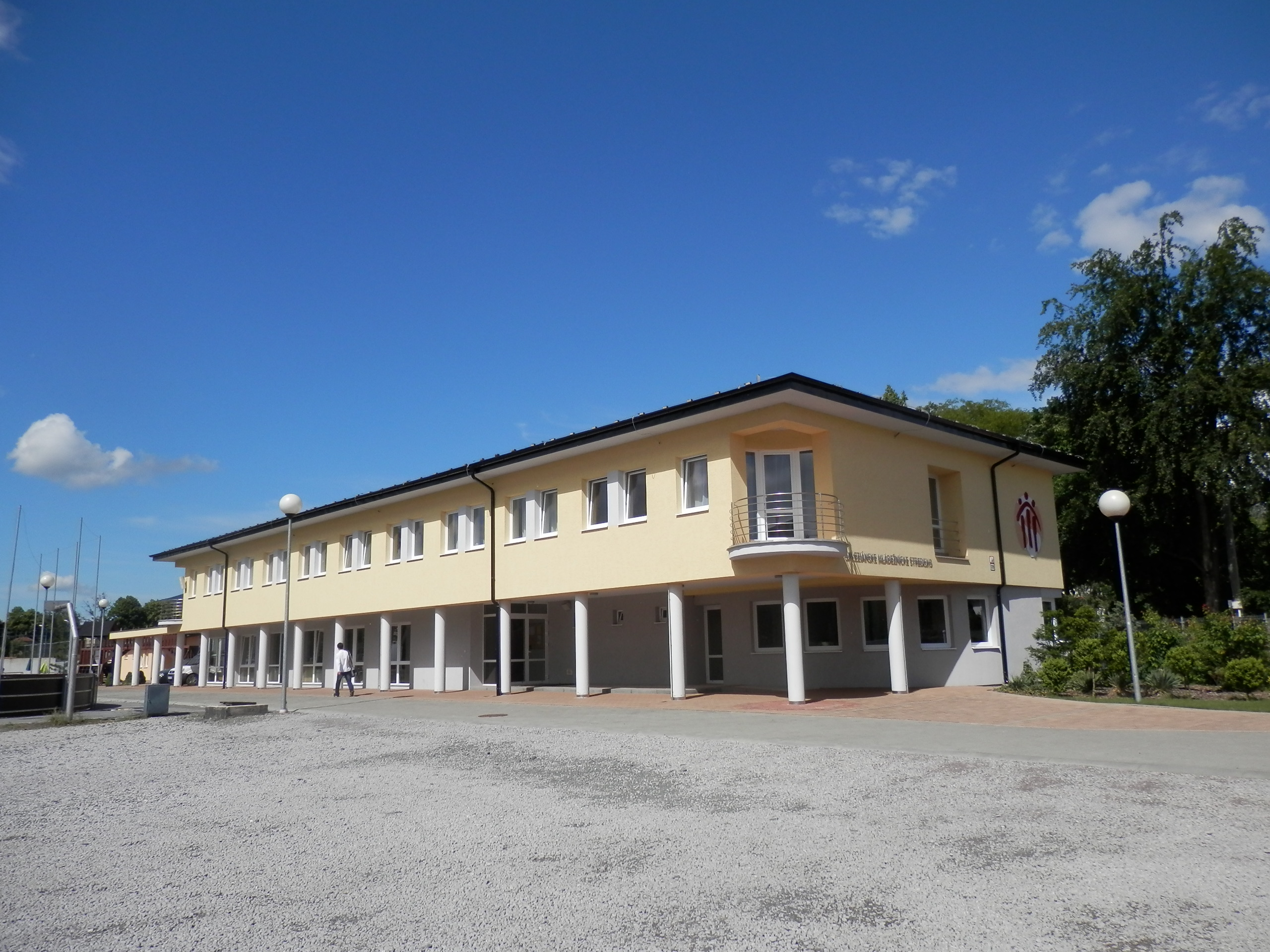 Mládežnícke stredisko - Saleziáni don Bosca, ulica Jána Bottu. Mesto Prešov.